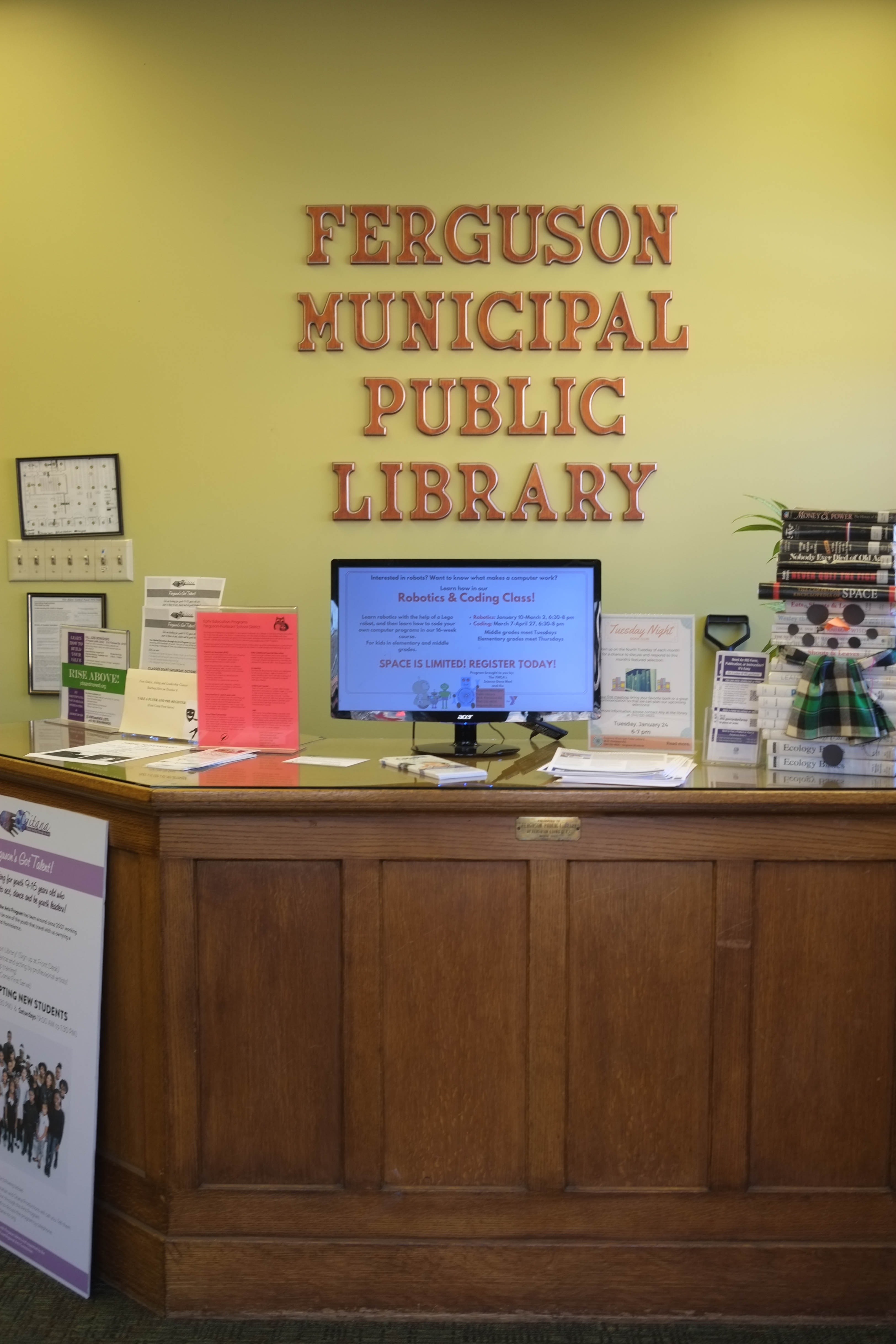 Ferguson Municipal Public Library